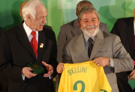 O ex-capitão da Seleção de 58, Bellini, e o presidente Lula durante comemorações aos 50 anos do primeiro título da Copa do Mundo conquistado pelo Brasil em 1958, no Palácio do Planalto